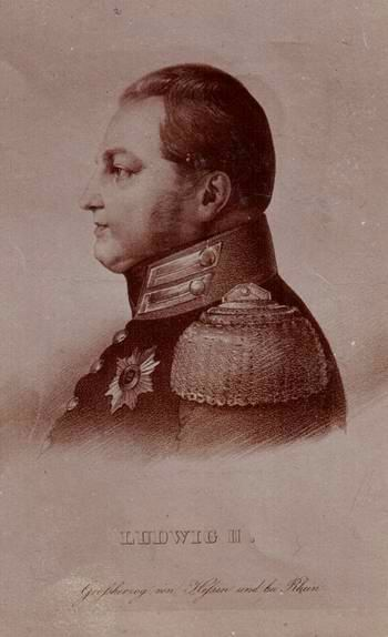 Ludwig II. (Hessen-Darmstadt) (1777-1848)